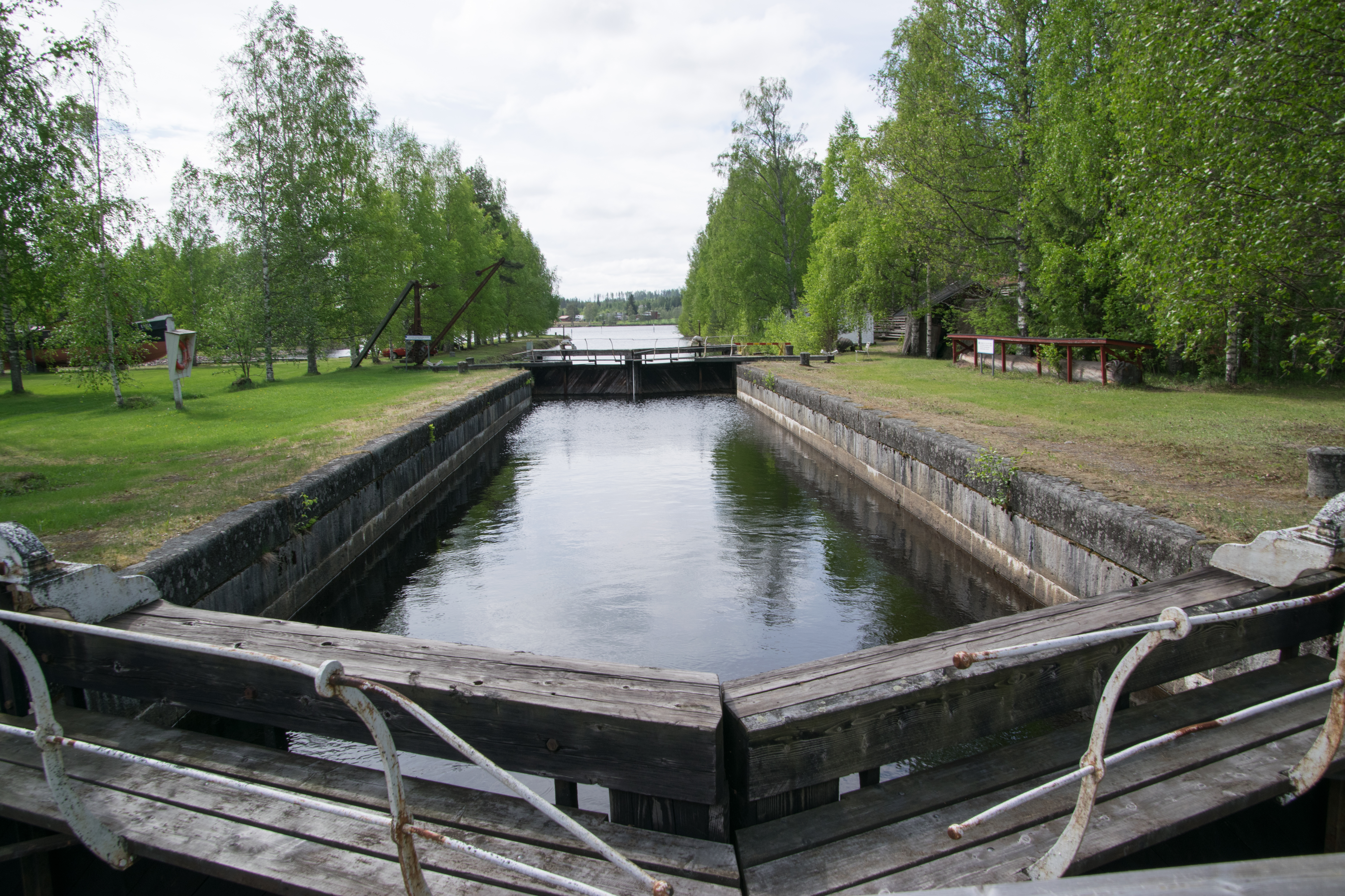 Jakokosken kanava